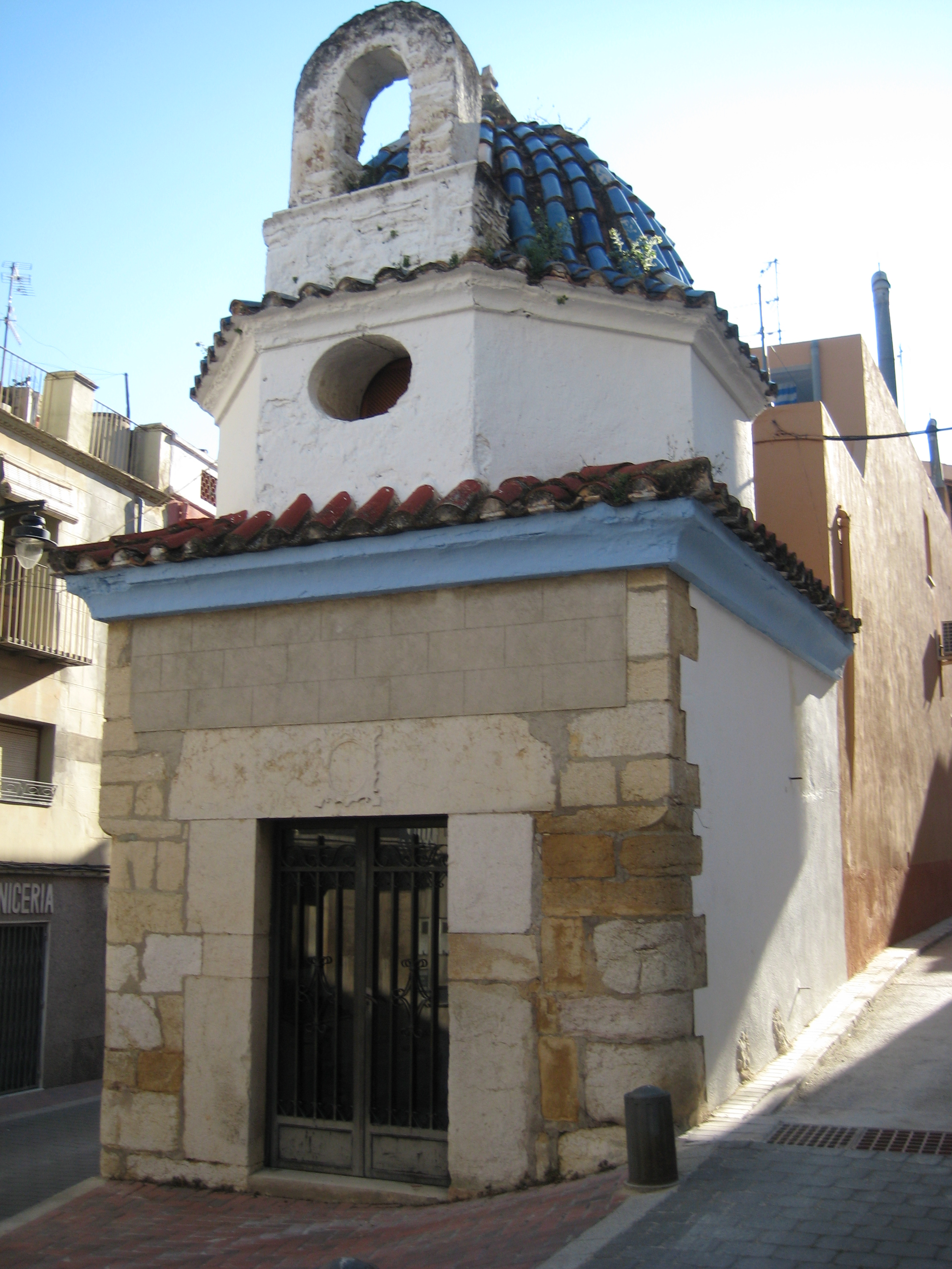 Capella de la Mare de Déu dels Desamparats de Càlig (Baix Maestrat)